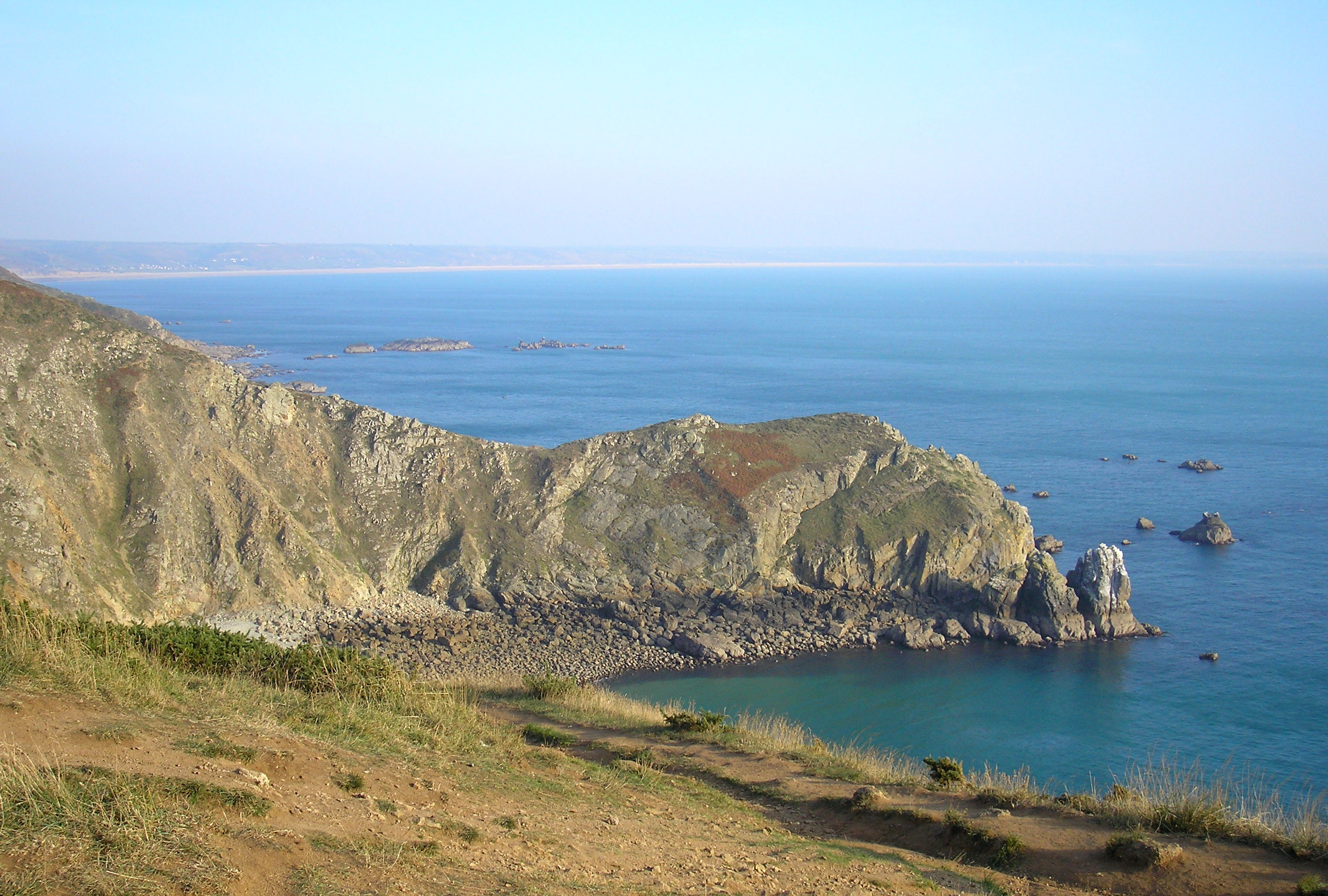 Jobourg (Normandie, France). Le Nez de Jobourg et, en arrière-plan, l'anse de Vauville.